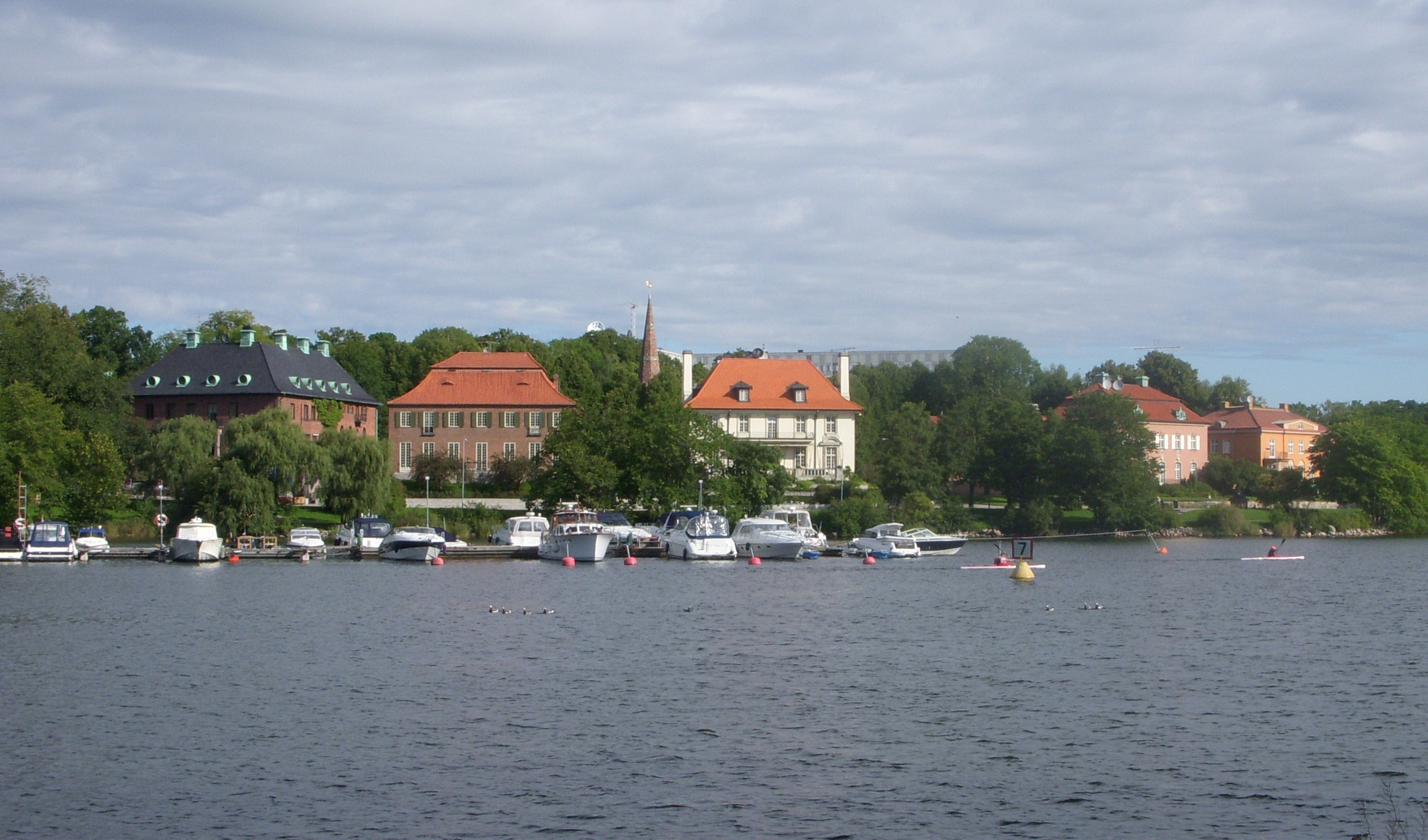 Diplomatstaden i Stockholm vy över Djurgårdsbrunnsviken